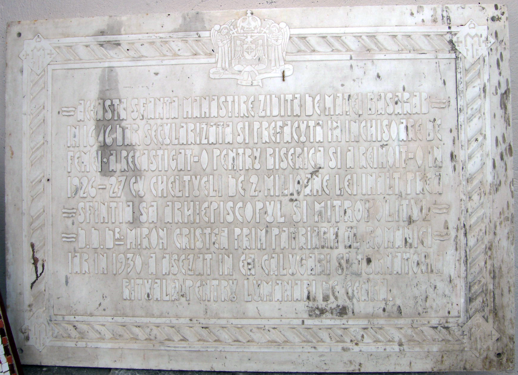 Pisania de la resfinţirea Mănăstirii Plătăreşti, România, din 1930